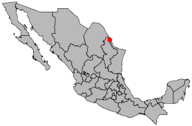 Location of Nueva Laredo, Tamaulipas, Mexico